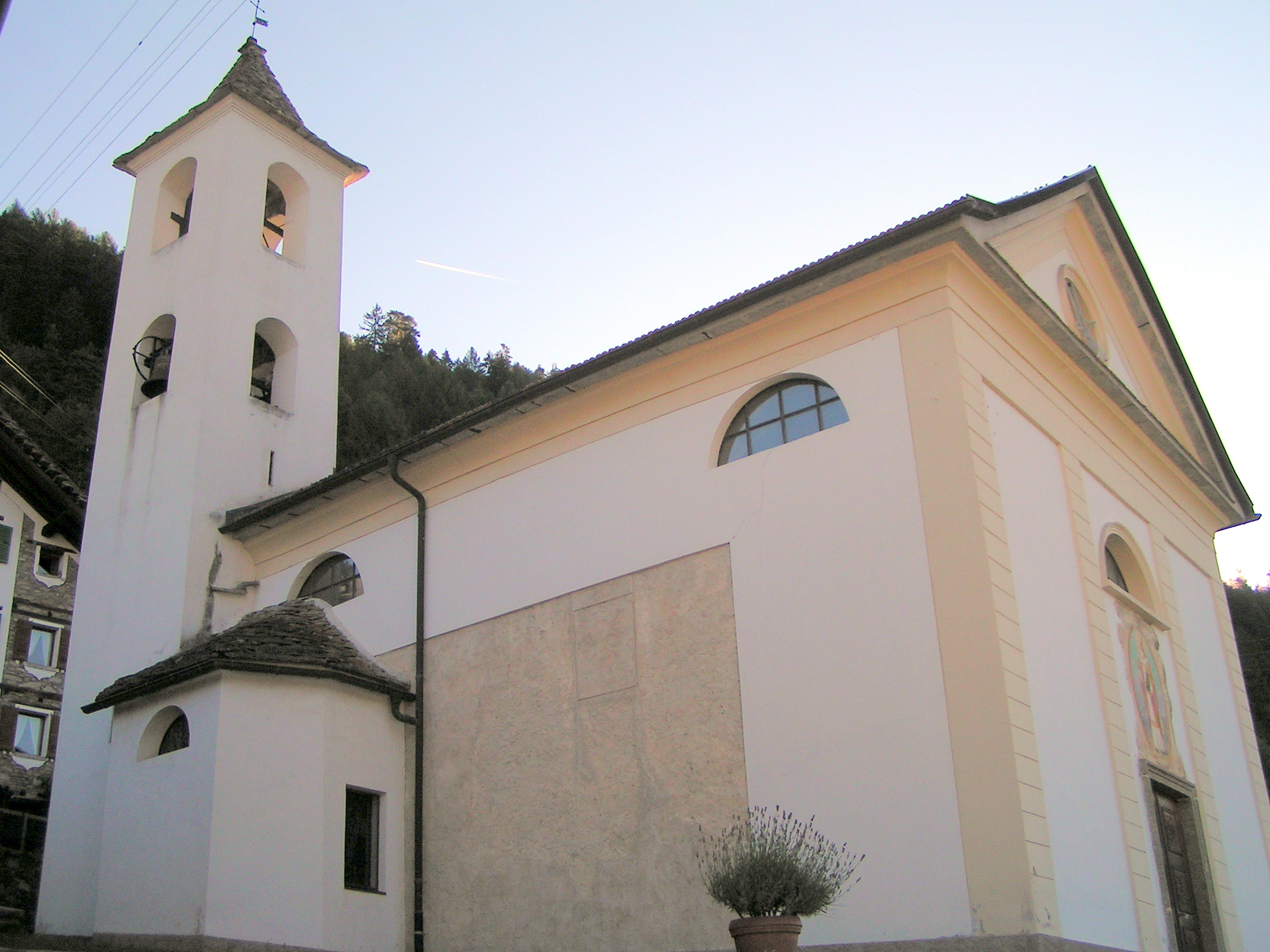 Chiesa parrocchiale di Sant'Atanasio Calpiogna